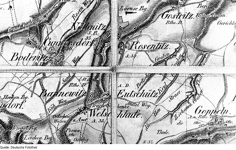 Original image description from the Deutsche Fotothek Bannewitz-Nöthnitz. Oberreit, Sect. Dresden, 1821/22